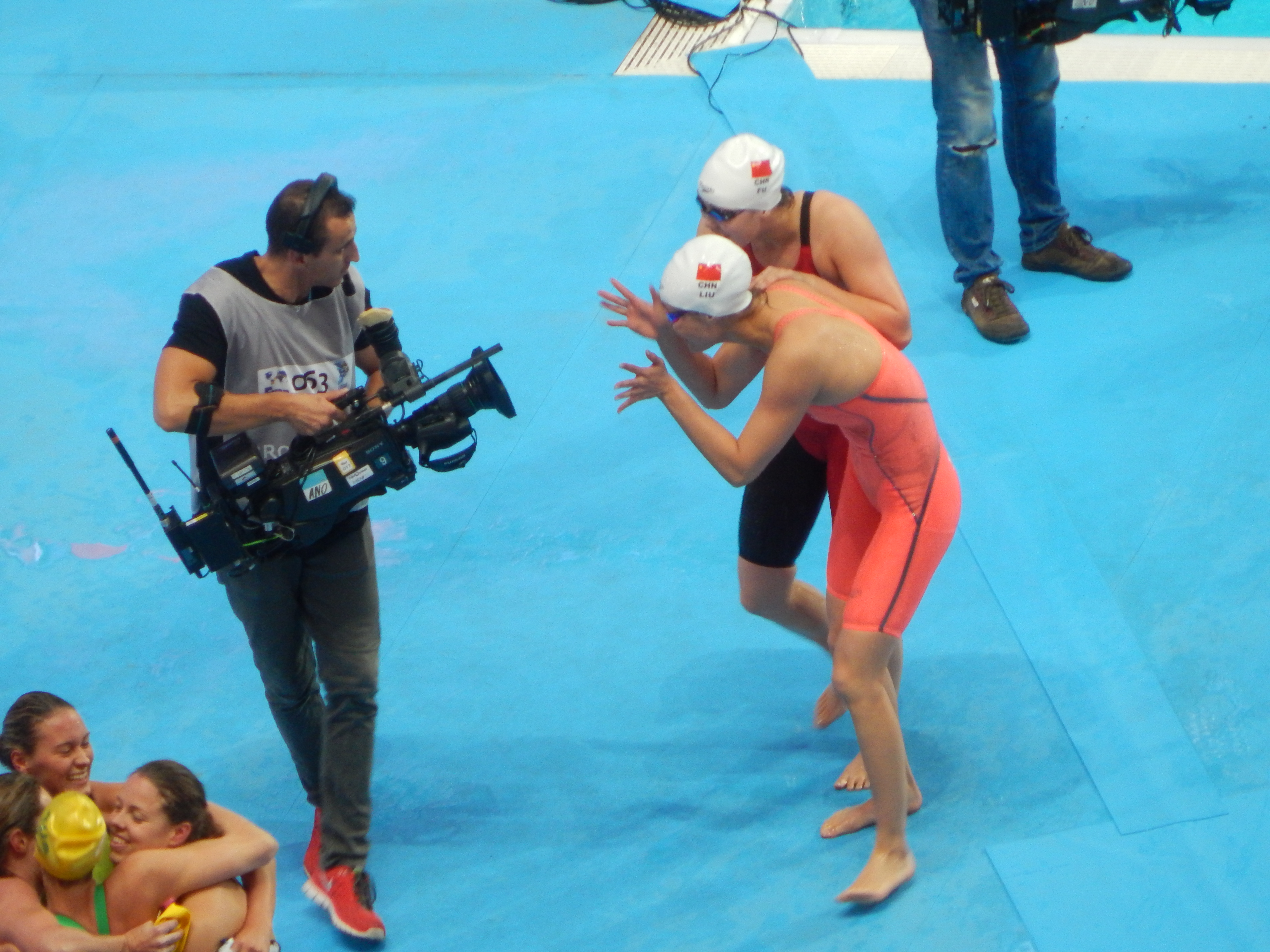 Фу Юаньхуэй и Лю Сянь празднуют золотую и бронзовую медали на чемпионате мира в Казани